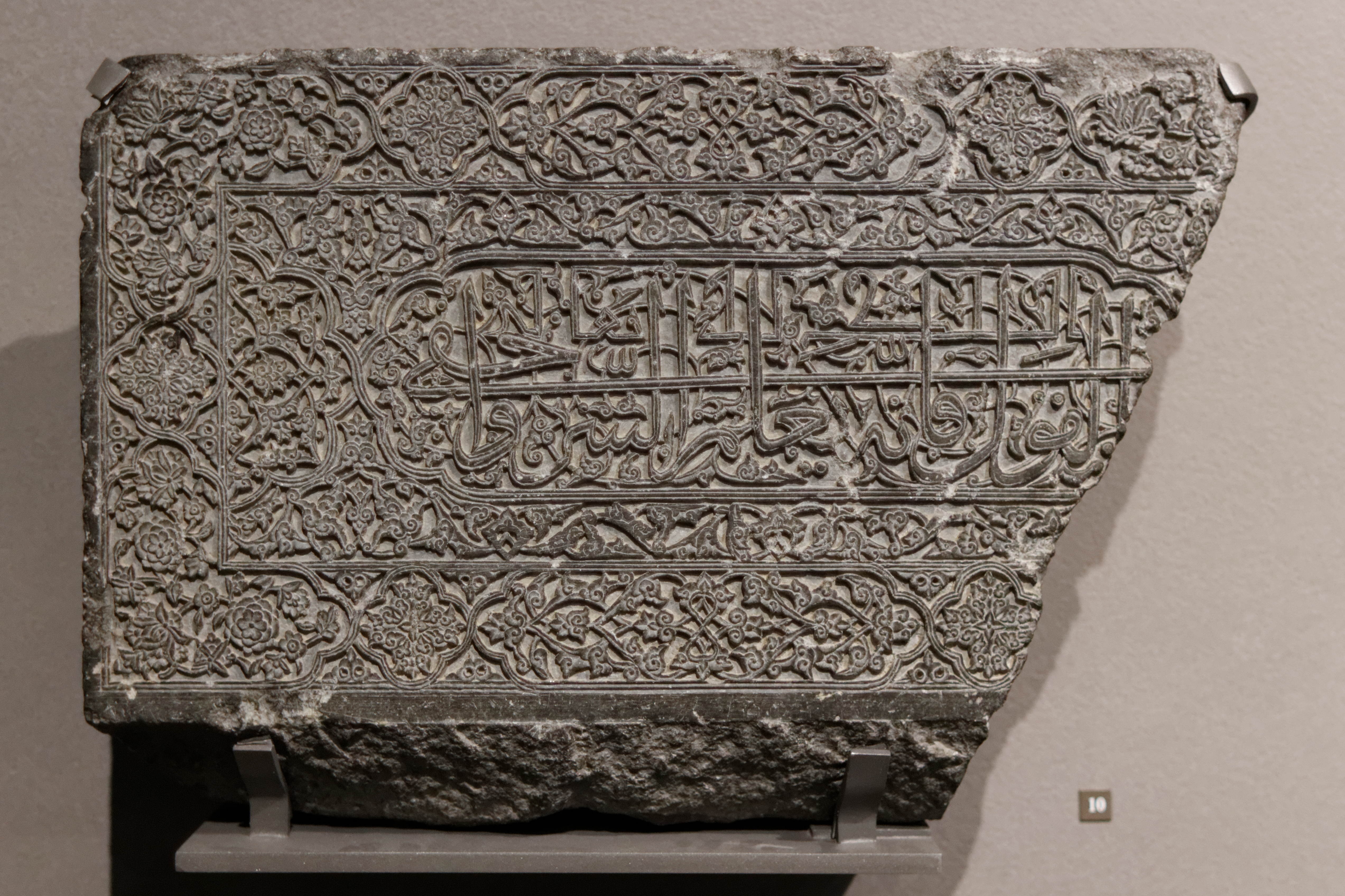 Room B - espace 75A (Iran, Asie centrale, milieu 13e - 15e siècle : L’âge d’or de la céramique architecturale)